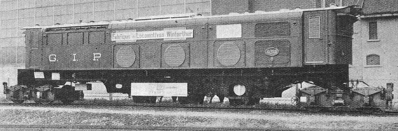 Bahn-Transport einer für die Great Indian Peninsula Railway gebauten elektrische Breitspurlokomotive aus den Werkstätten der Schweizerischen Lokomotiv- und Maschinenfabrik Winterthur nach Antwerpen